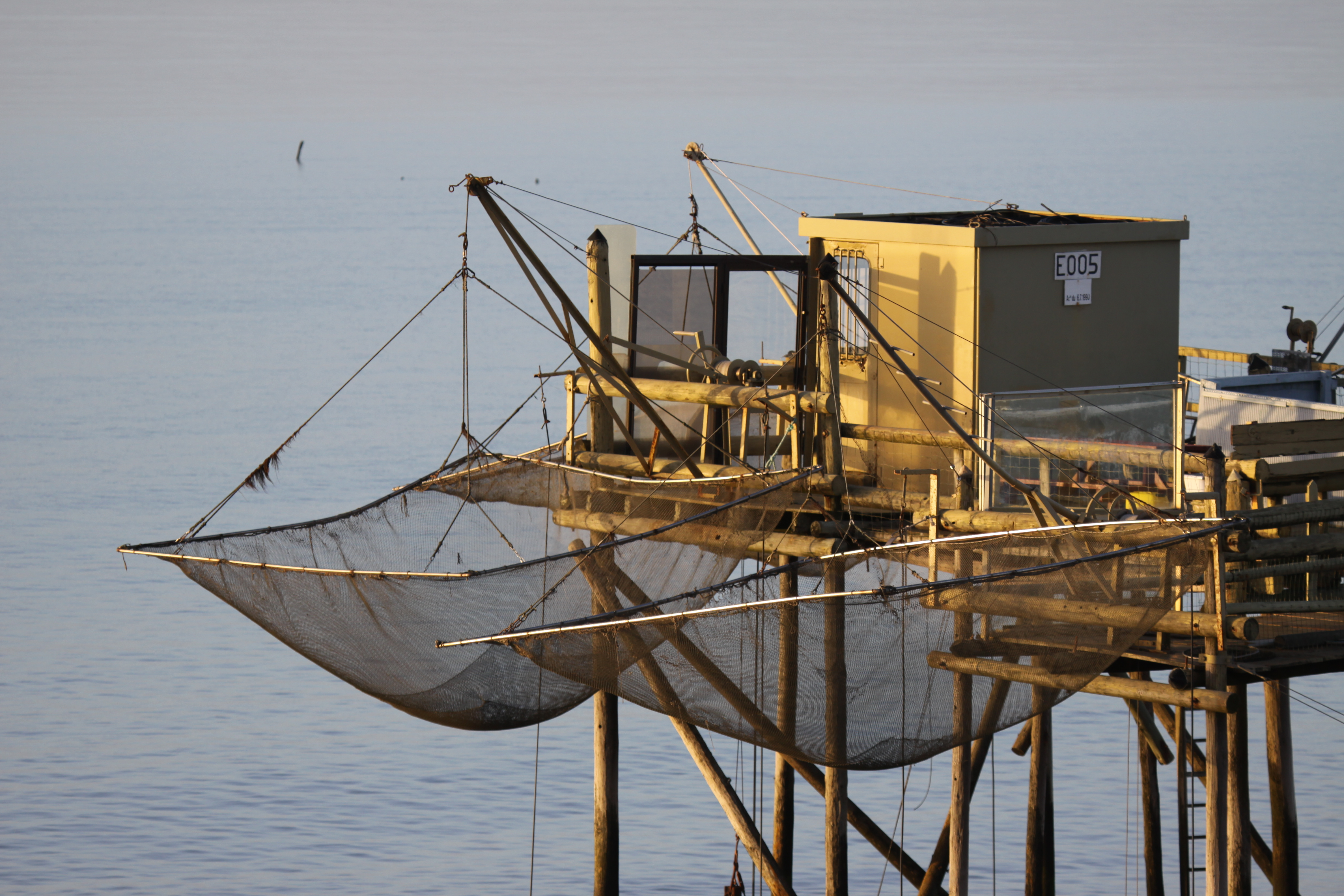 Deux carrelets (engins de pêche) suspendus, chacun, à une perche à l' aide d'un cable enroulé sur un treuil. Esnandes, Charente Maritime, France.